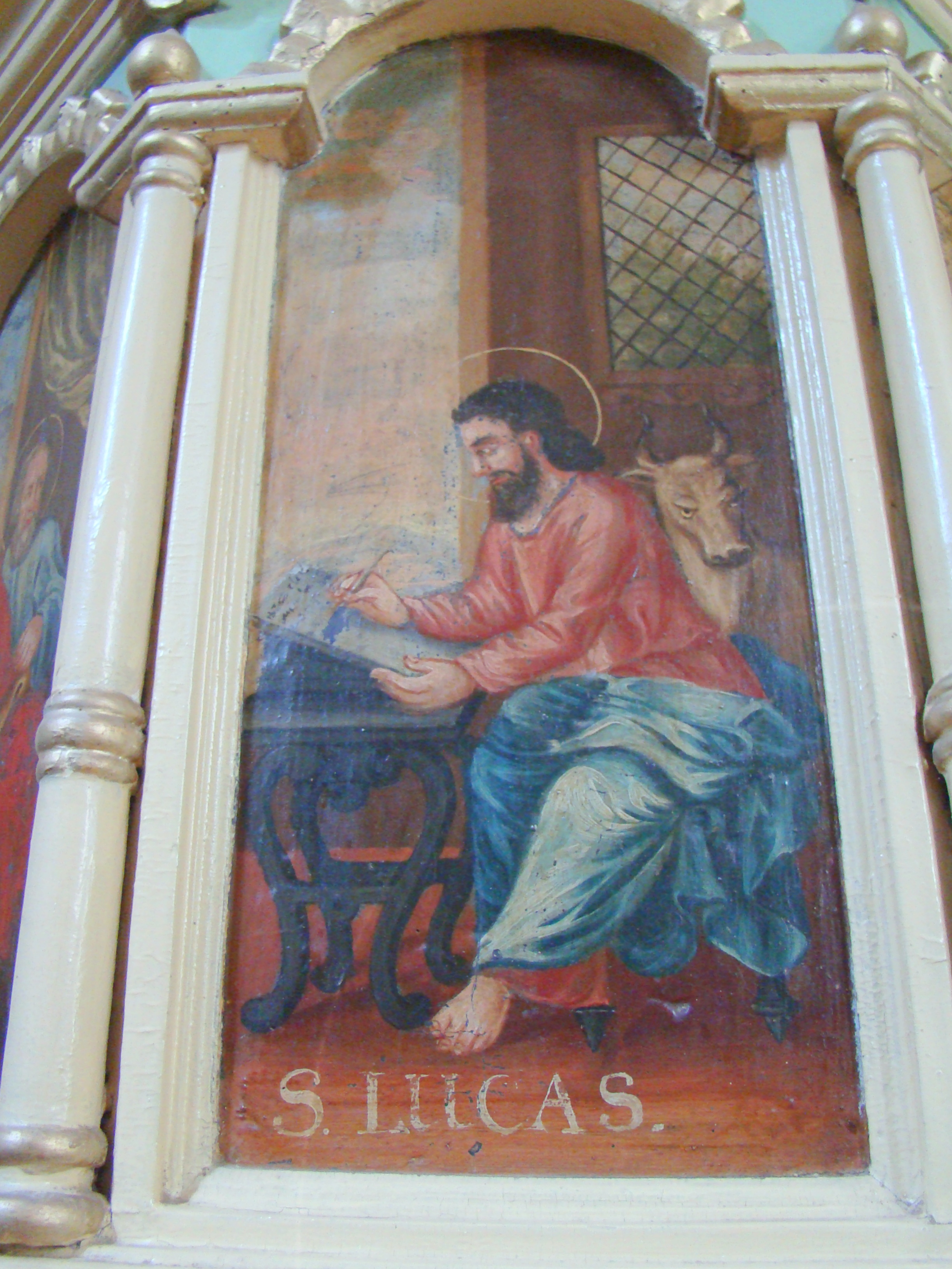 Biserica evanghelică fortificată, sat Șoarș; comuna Șoarș 282 sec. XV - XVI, 1806